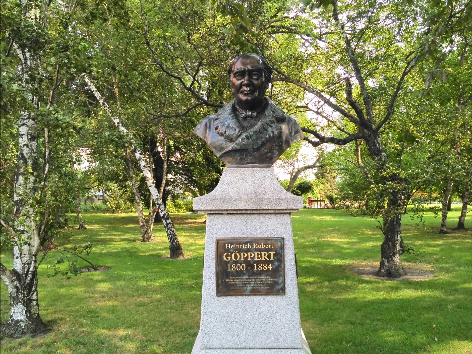 Wrocław, Ogród Botaniczny - popiersie prof. Heinricha Roberta Göpperta (1800-1884). Uroczystego odsłonięcia pomnika dokonano 1 października 2014 r. Nowe popiersie z brązu, które stanęło na granitowym cokole w pobliżu głównej alei, wykonał Stanisław Wysocki z synem Michałem.